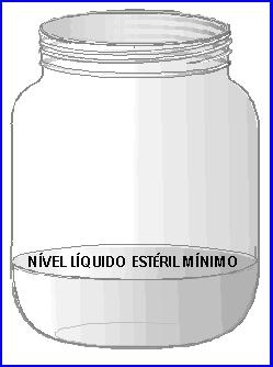 Verificar a capacidade do frasco coletor escolhido e colocar soluÃ§Ã£o fisiolÃ³gica ou Ã¡gua destilada estÃ©ril no frasco coletor, de modo a atingir a marca do nÃ­vel lÃ­quido mÃ­nimo obrigatÃ³rio para que seja formado o selo dâ€™Ã¡gua, conforme a capacidade do reservatÃ³rio.